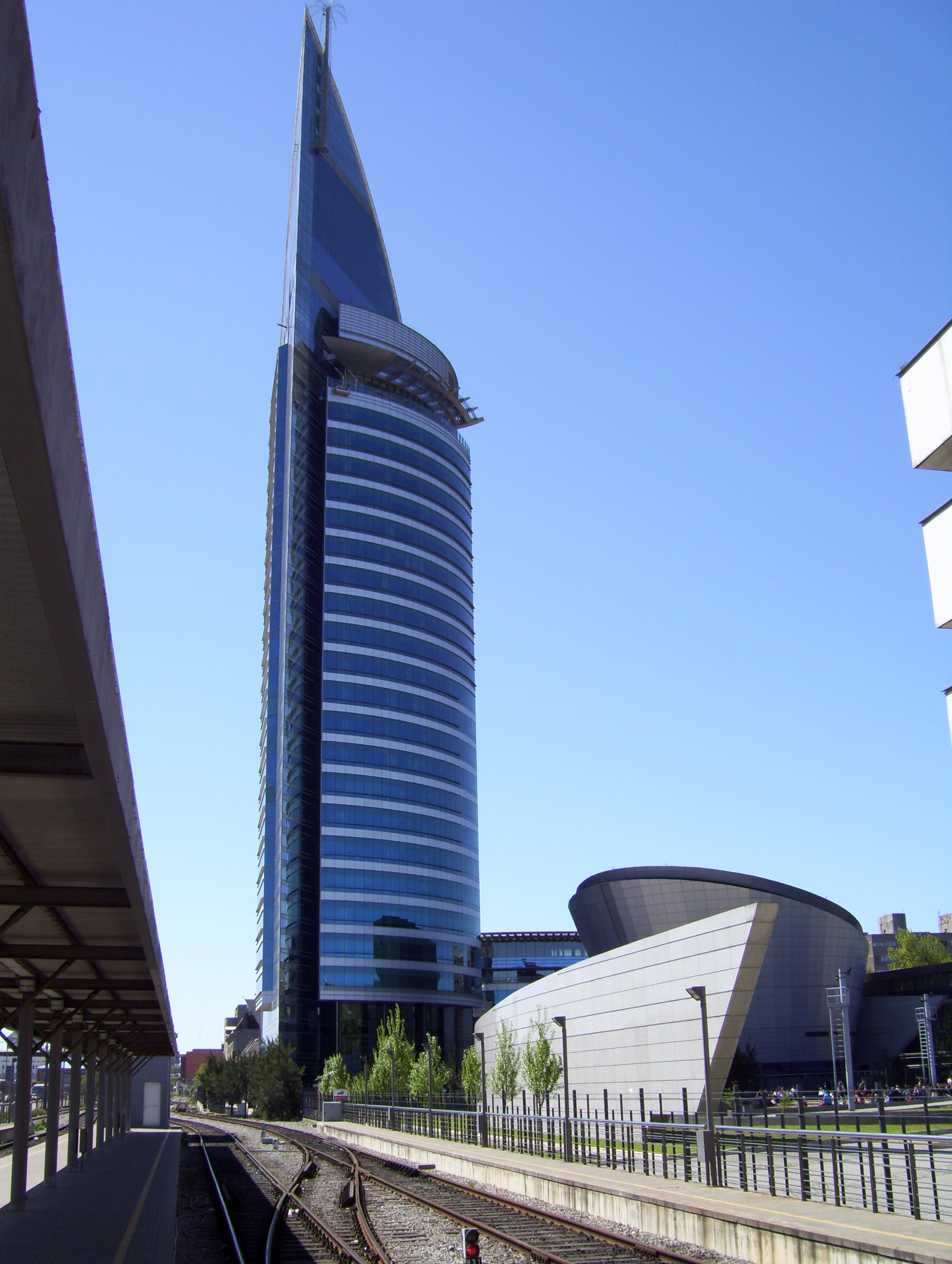 Torre de las Telecomunicaciones UY